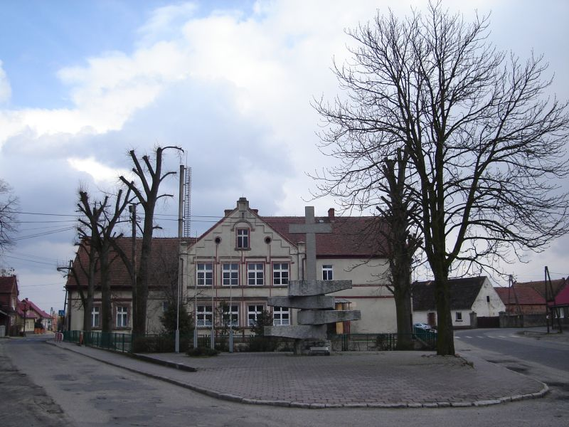 Szkoła w Szczańcu